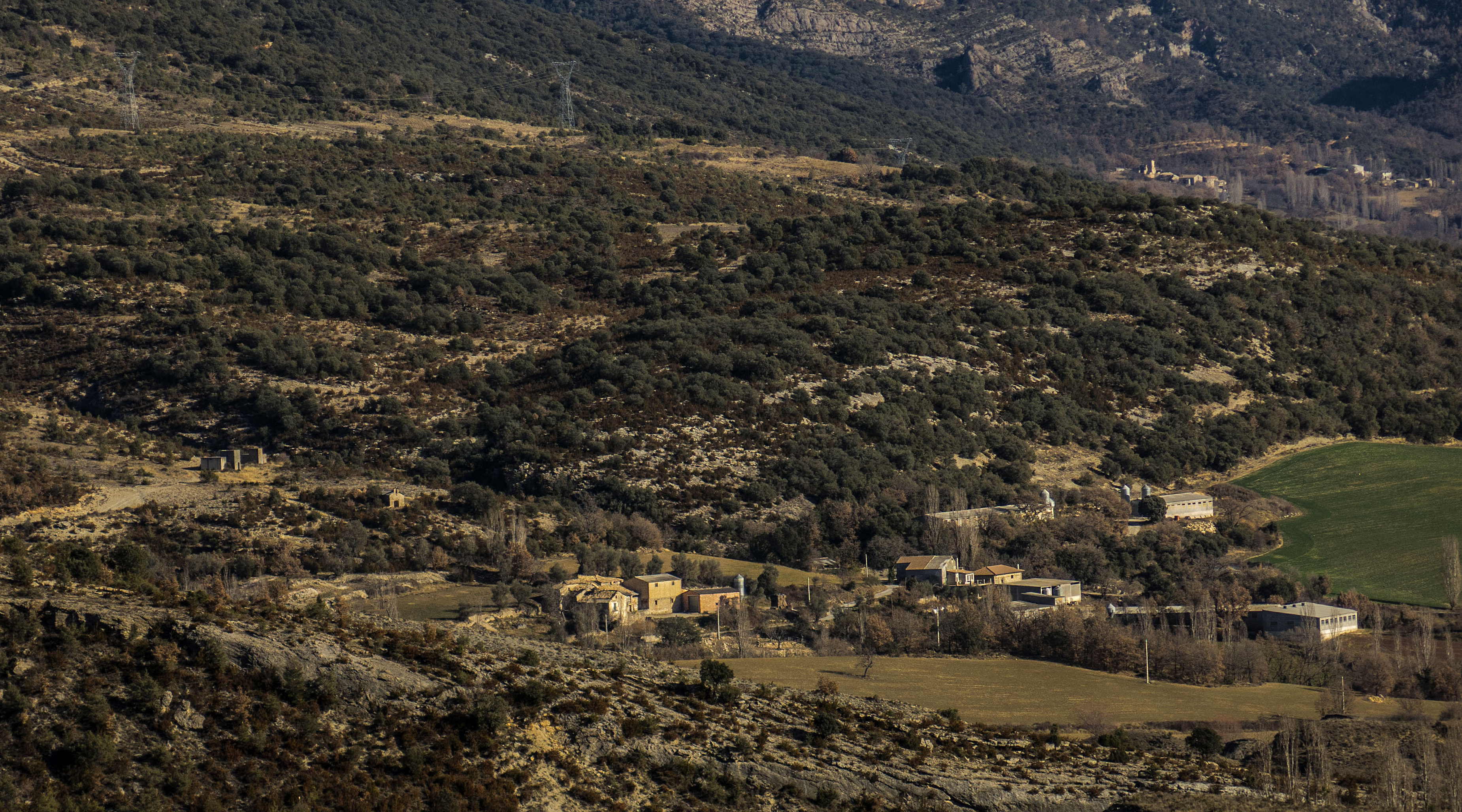 Llogaret disseminat, situat en el municipi d'Isàvena, a la Baixa Ribagorça de l'Aragó, sota la Serra del Jordal.